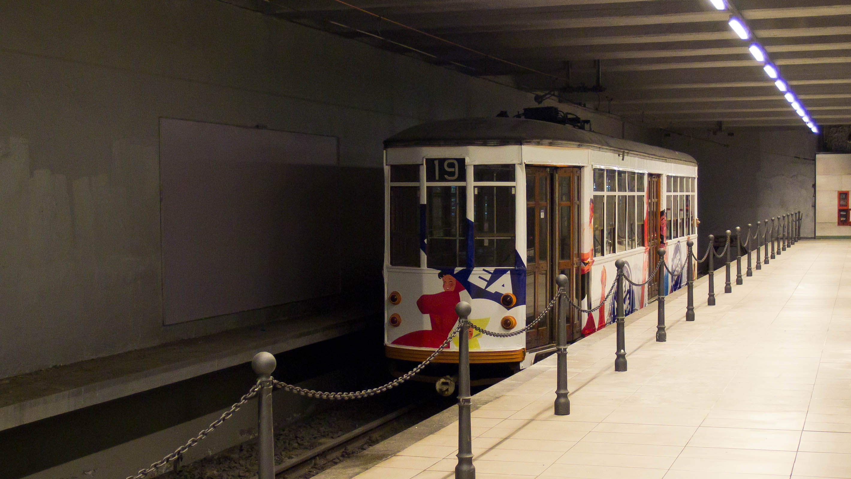 Tram serie 1500 dell'ATM di Milano, esposto in livrea pubblicitaria nella stazione della metropolitana di Garibaldi.